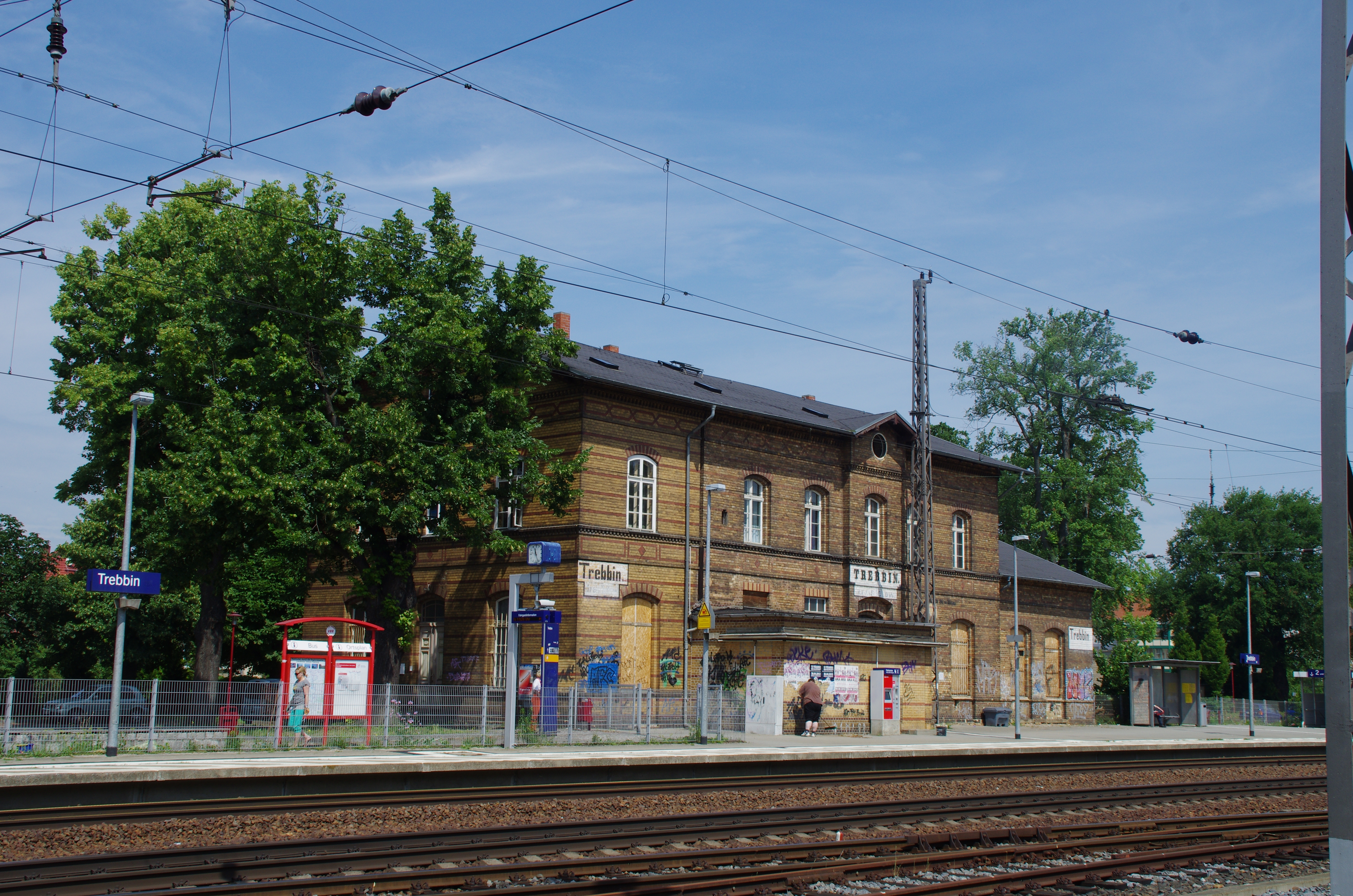 Trebbin in Brandenburg. Der Bahnhof steht unter Denkmalschutz.